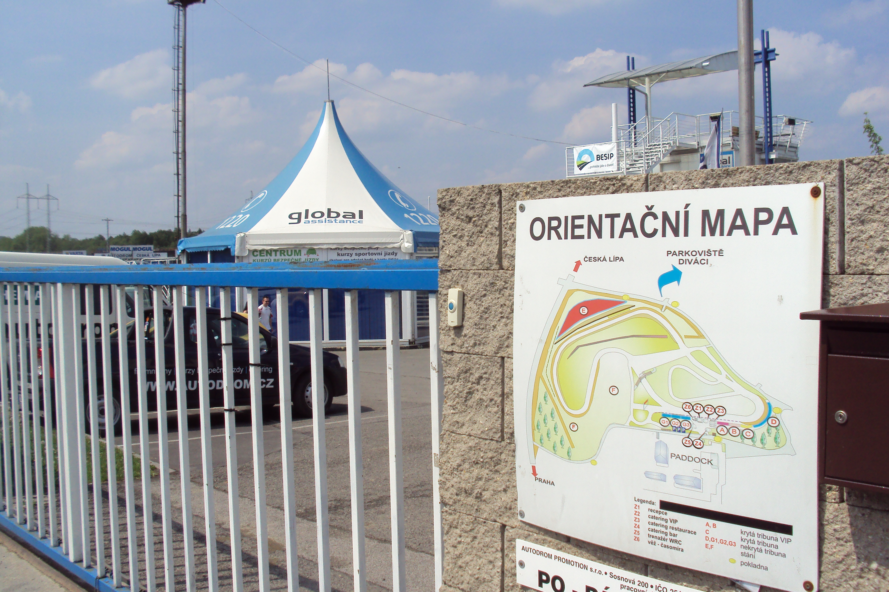 Plánek na zadním vchodu do autodromu v Sosnové